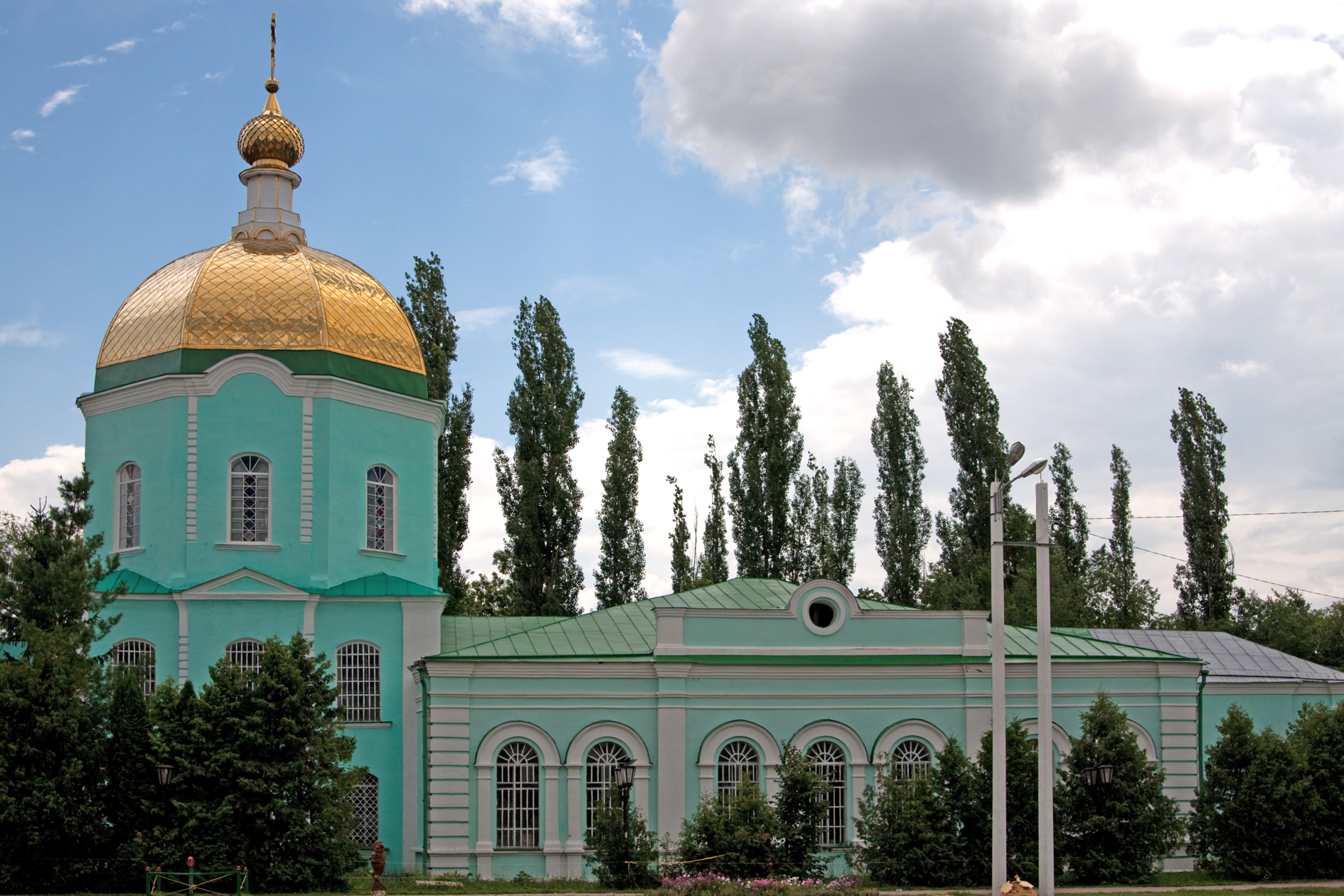 Церковь Вознесенская (Липецкая область, Чаплыгин, Советская улица)